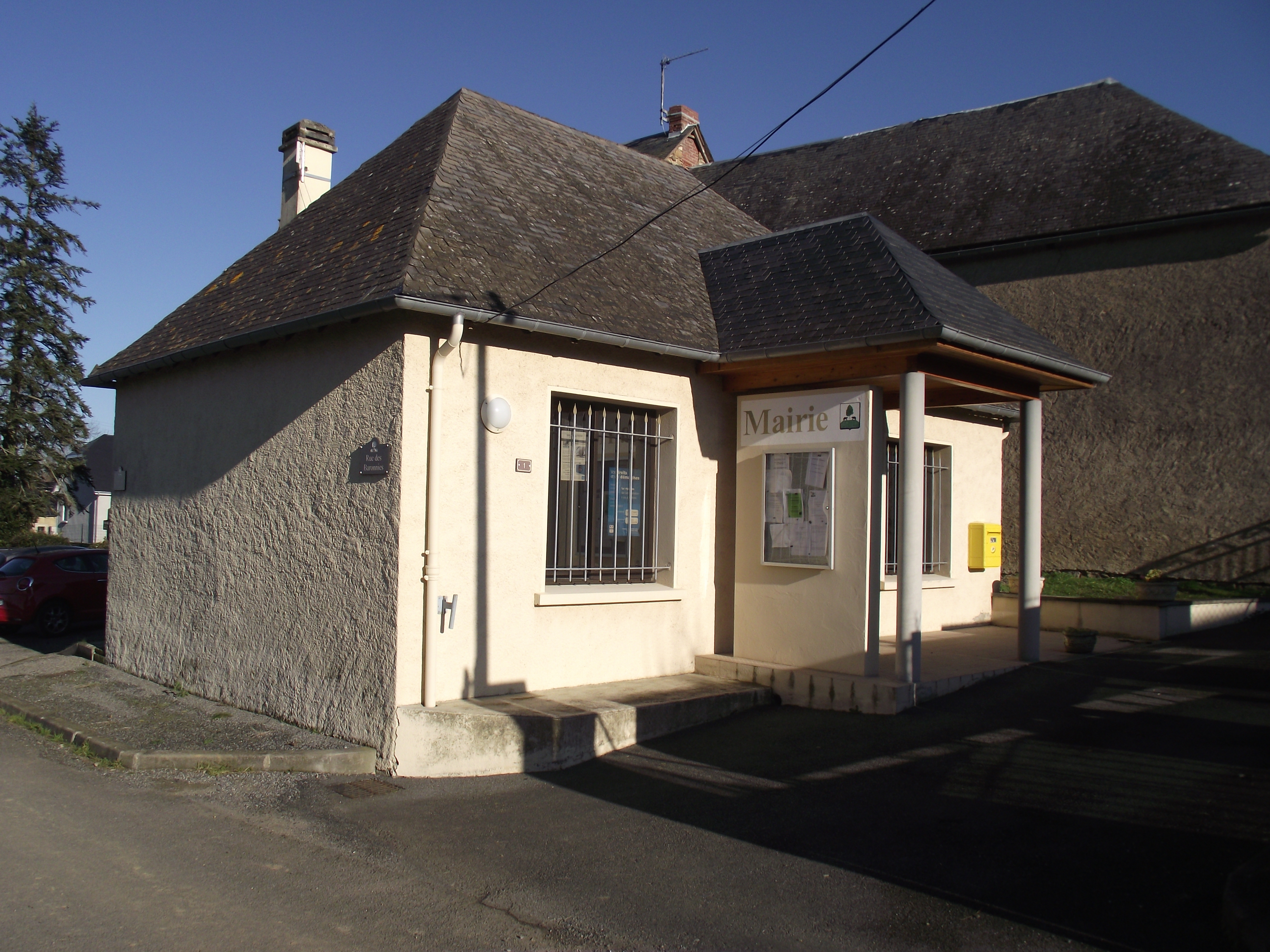 Mairie d'Artiguemy (Hautes-Pyrénées, France)